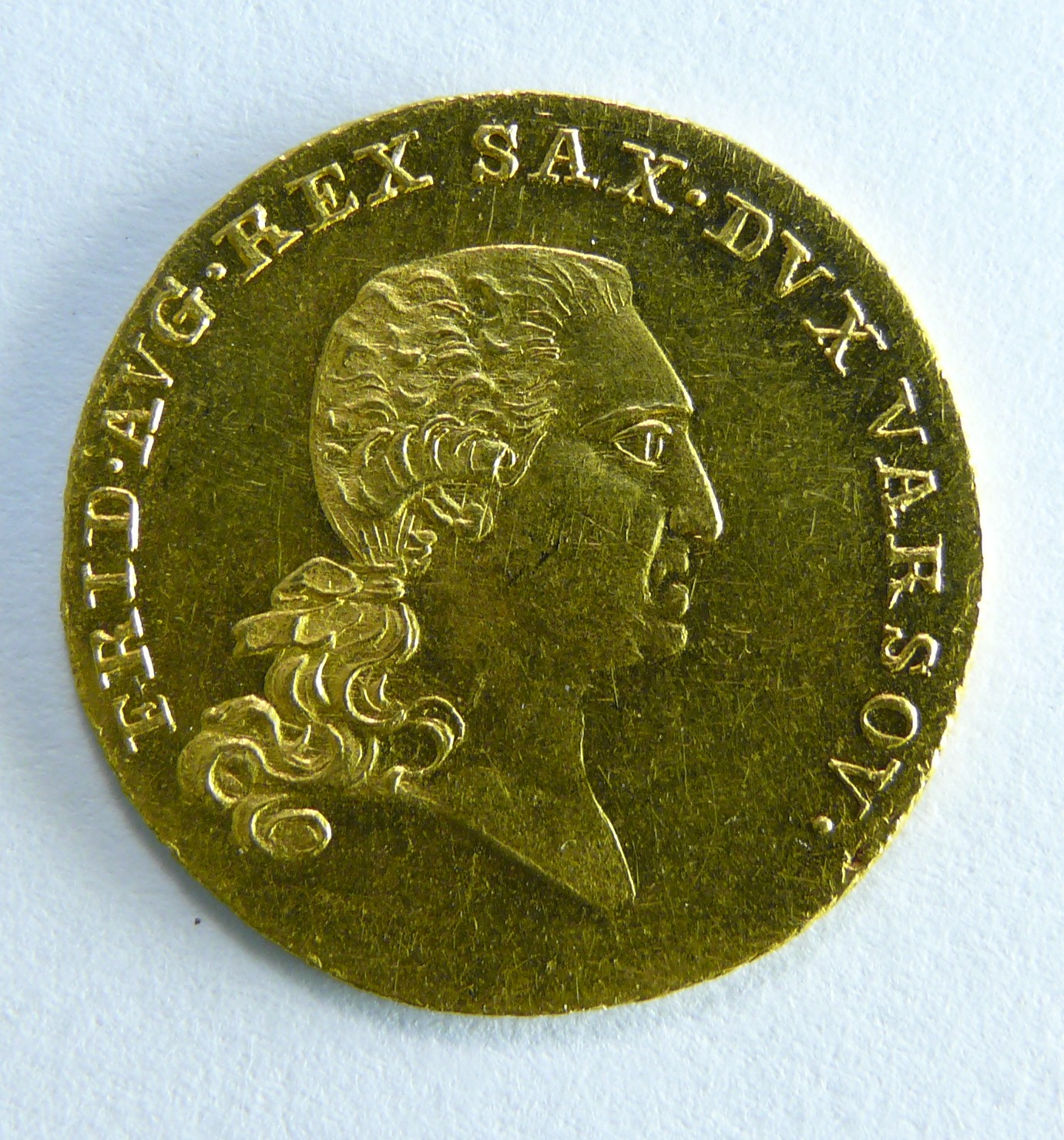 Księstwo Warszawskie, Dukat (18 złotych), Mennica w Warszawie, 1812, Złoto, bity, Śr. 22, 2 mm; waga 3,49 g, A: głowa Fryderyka Augusta IV Wettina - prawy profil, Włosy (peruka) długie, związane z tyłuwstążką. w otoku napis: „FRID.AUG.REX SAX.DUX VARSOV.